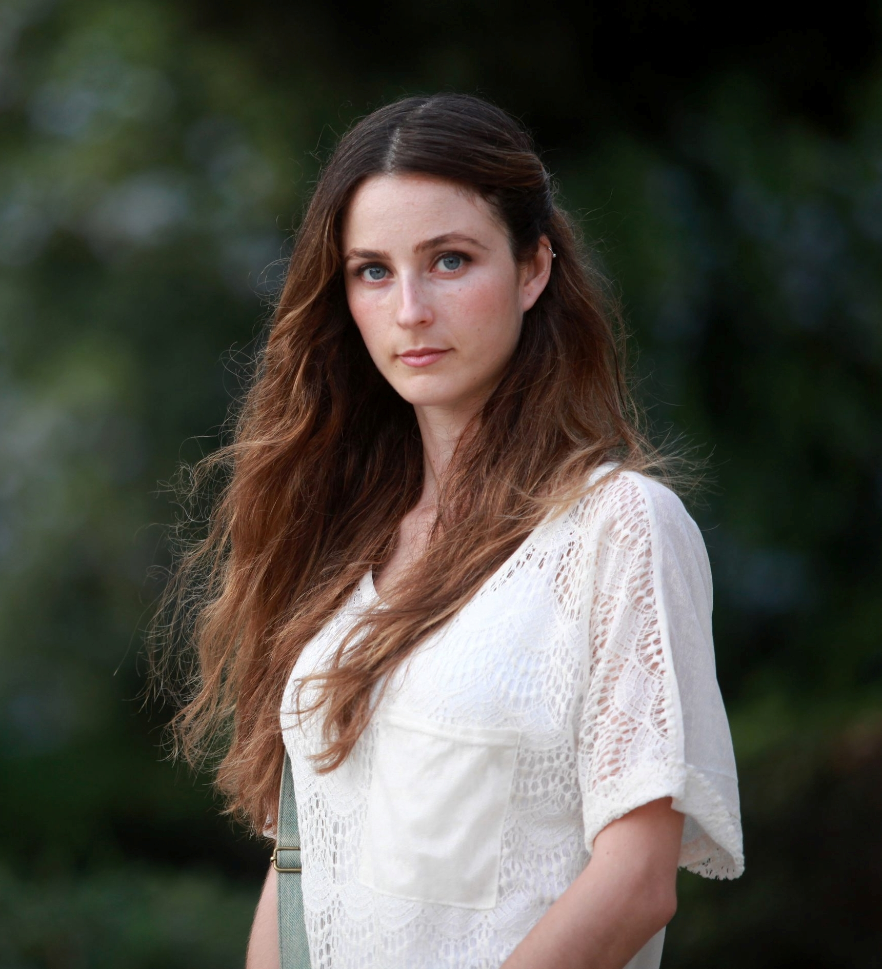 he:מירב כהן